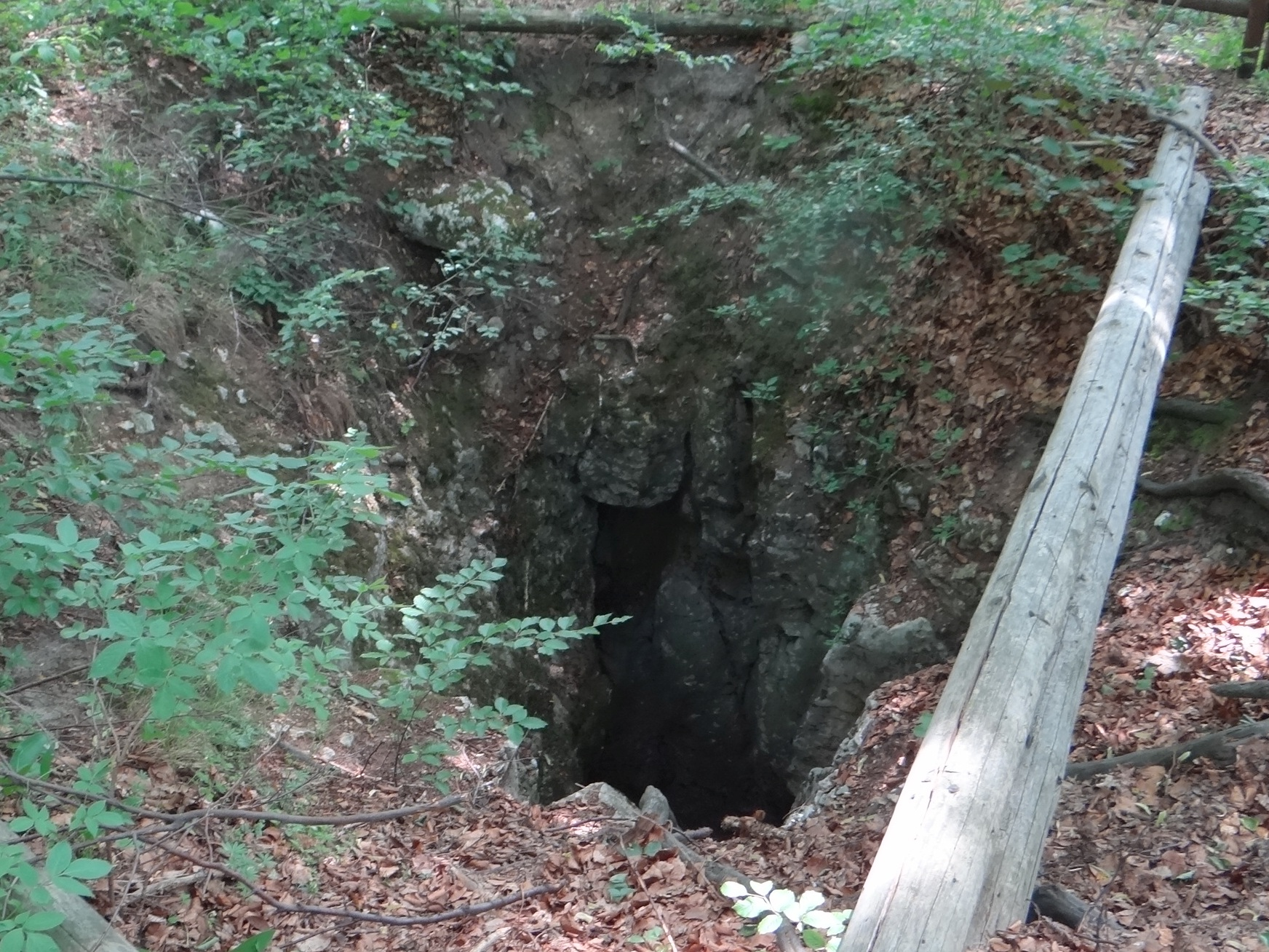 Jaskinia Januszkowa Szczelina na Januszkowej Górze